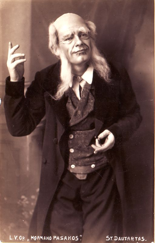 Stasys Dautartas (1899 m. rugsėjo 22 d. Kaunas – 1989 m. sausio 9 d. Vilnius) – Lietuvos teatro režisierius, dainininkas (tenoras), baleto artistas. Fotografijoje tarno vaidmuo Žako Ofenbacho operoje "Hofmano pasakos".